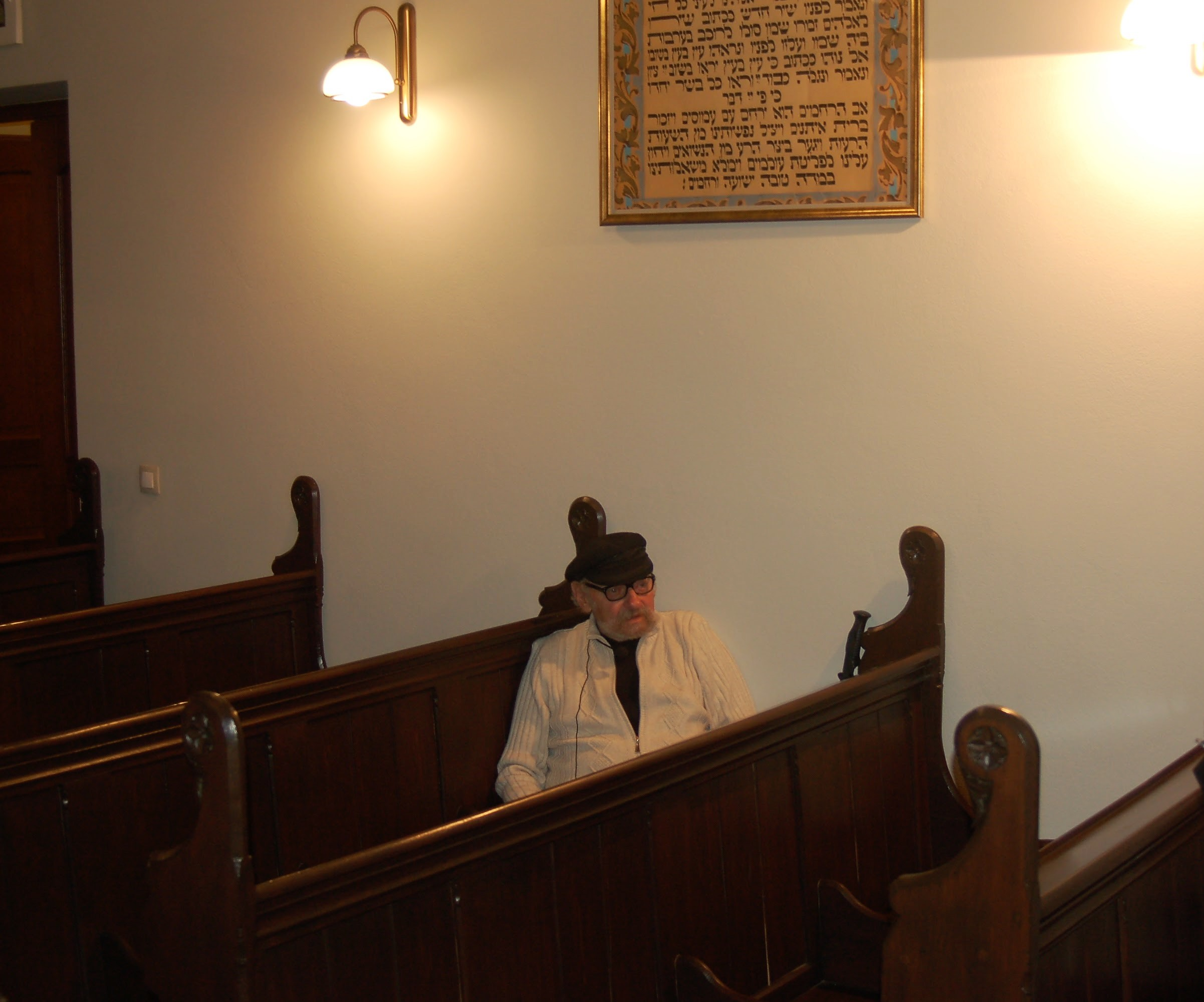 ספסלי ה'שטיבל' בברסלאו, ששימש בעיקר את ה'אוסטיודן', יהודי מזרח אירופה, ושרד את השואה